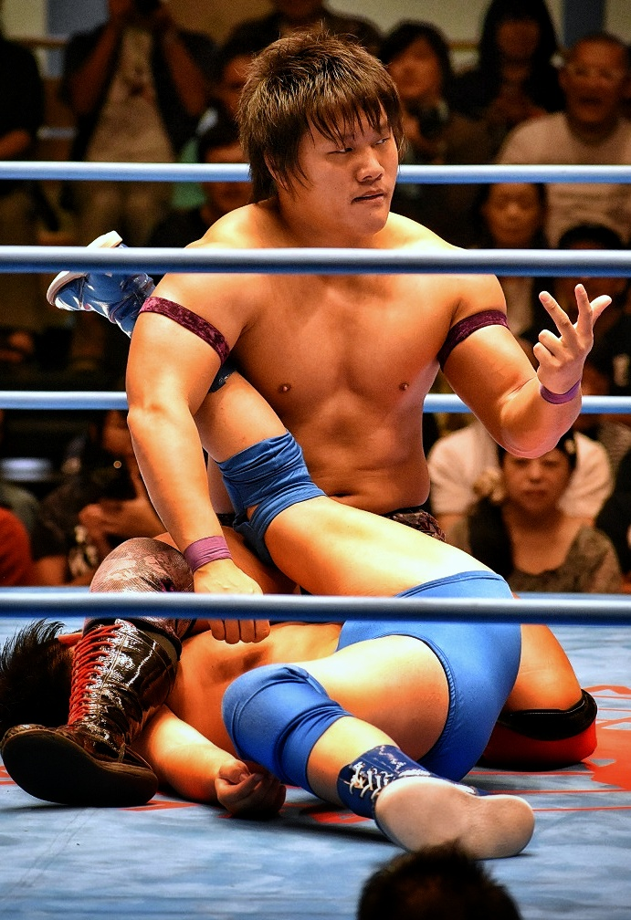 プロレスラーの岩本煌史